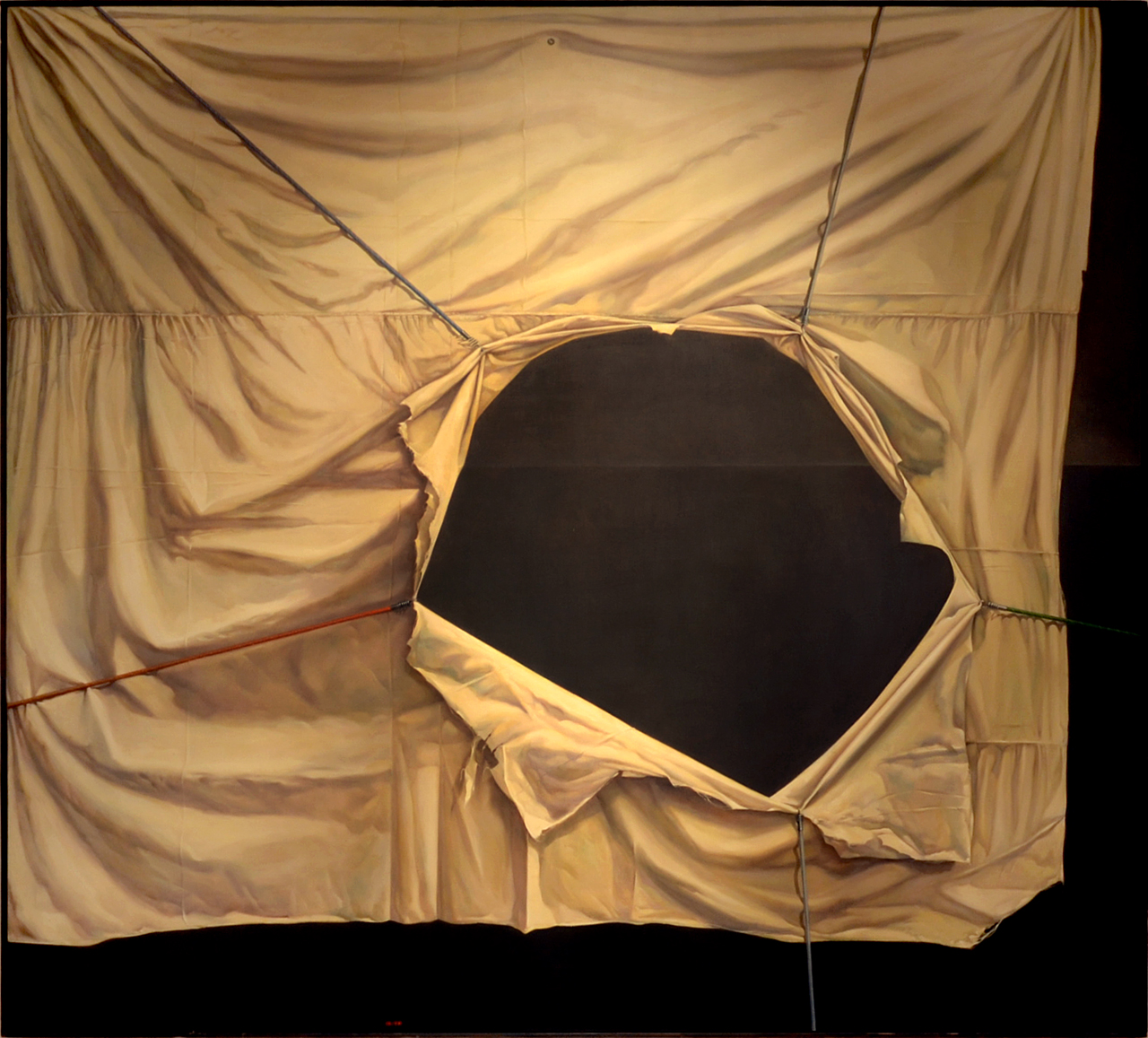 Theodor Pištěk, Český horizont, olej na plátně, 1979